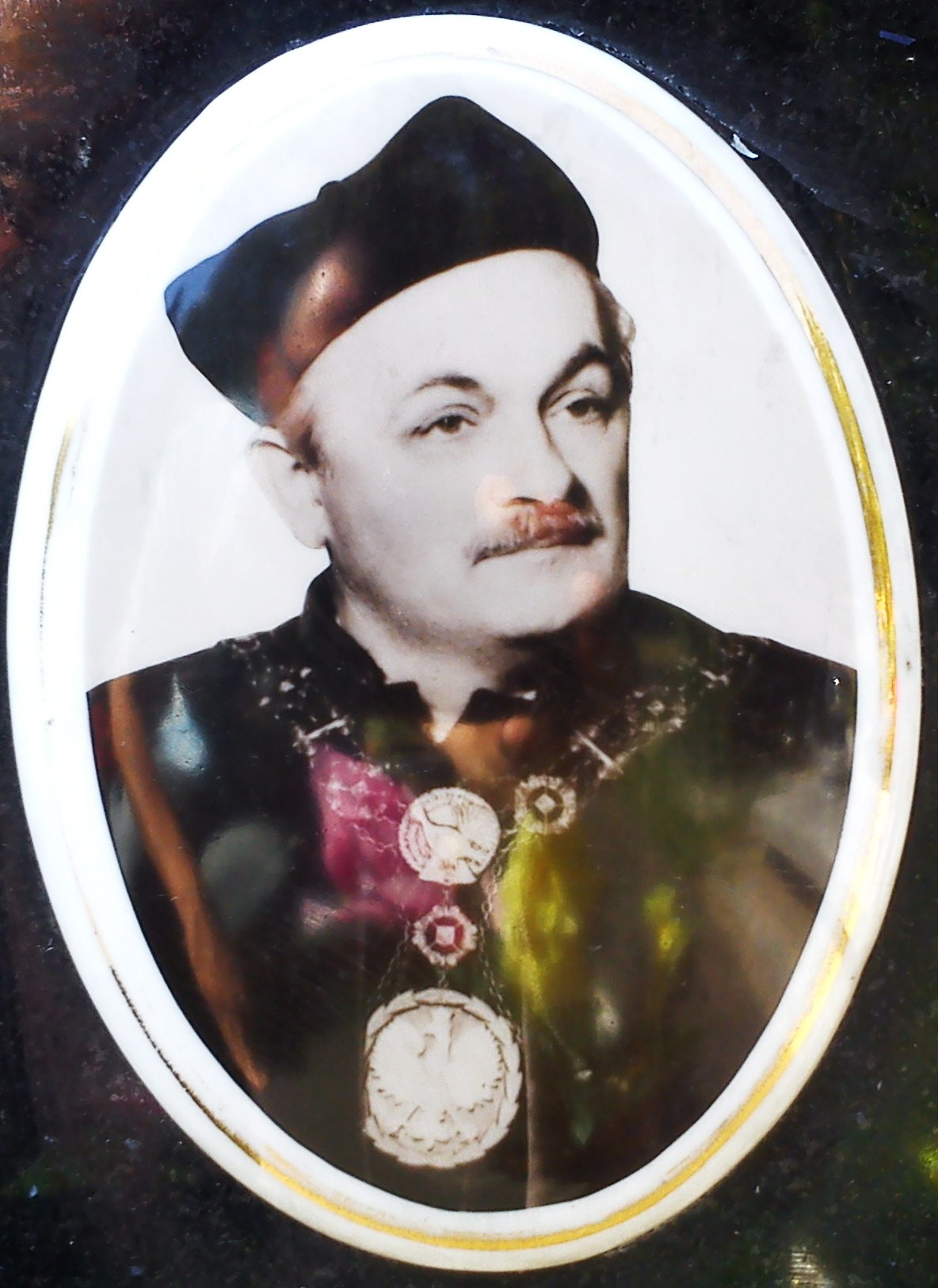 Poznań - cmentarz przy ul. Szczawnickiej. Grób prof. Jana Meixnera.